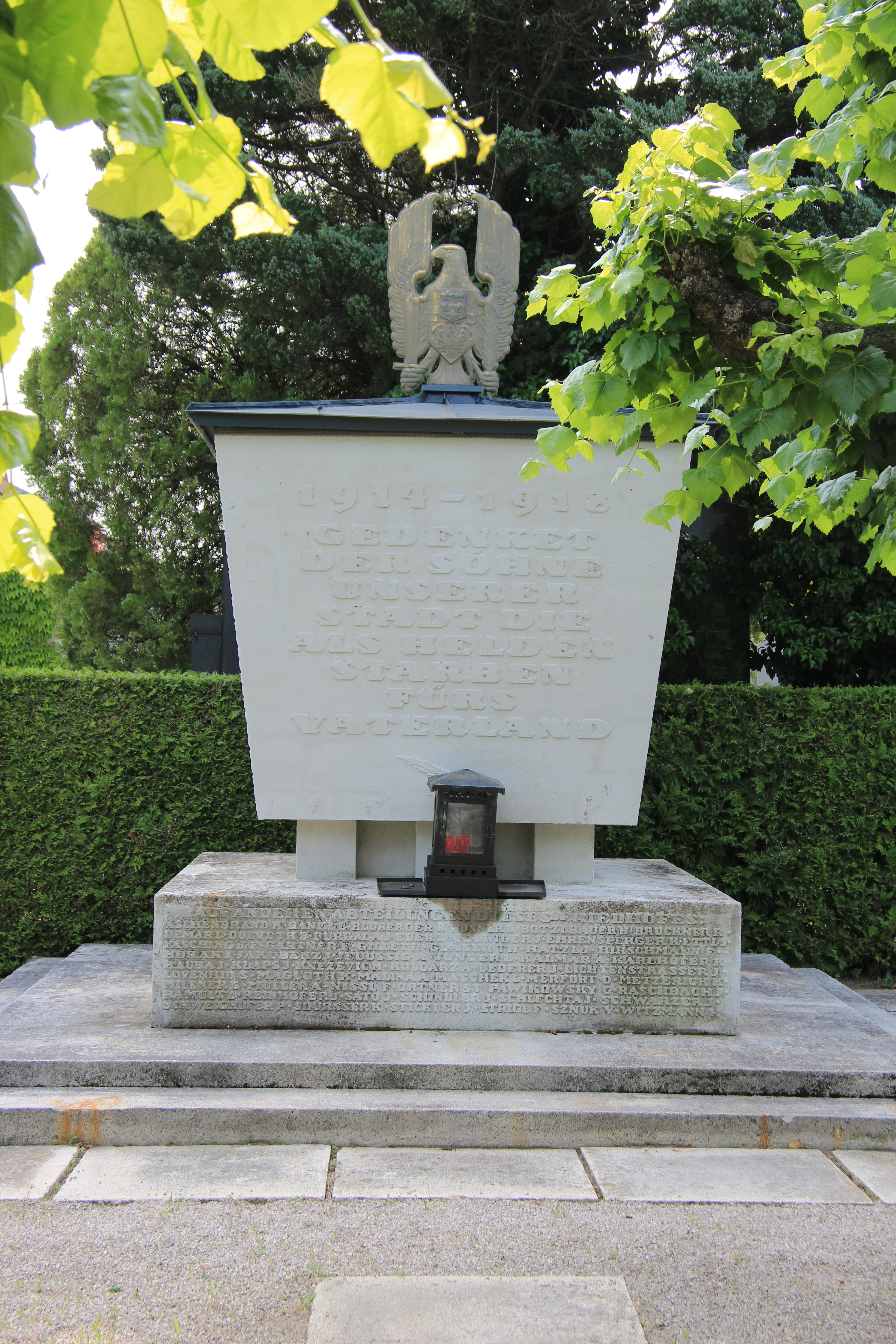 Stadtpfarrfriedhof Baden